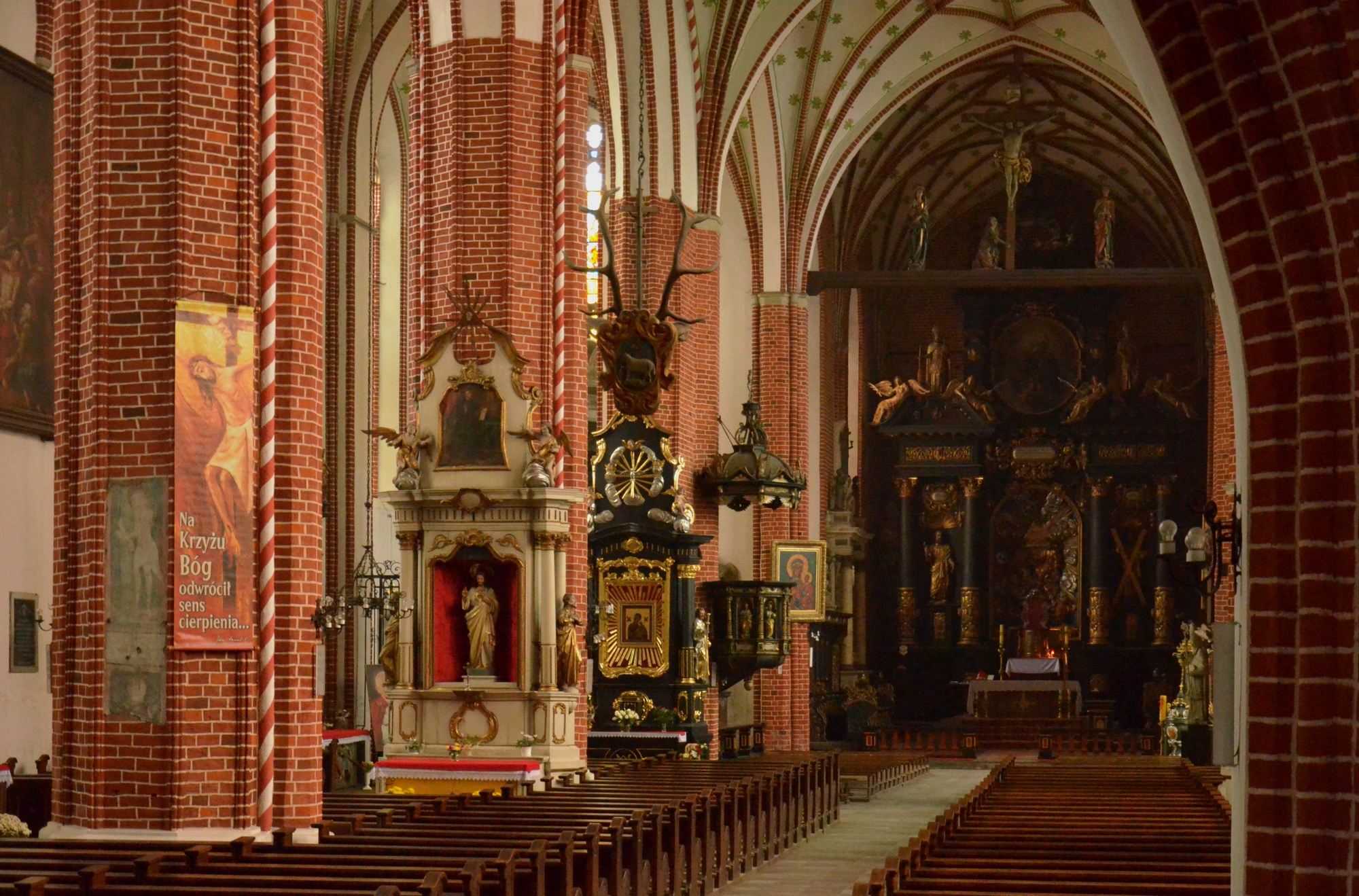 Bazylika konkatedralna Świętej Trójcy w Chełmży, wnętrze